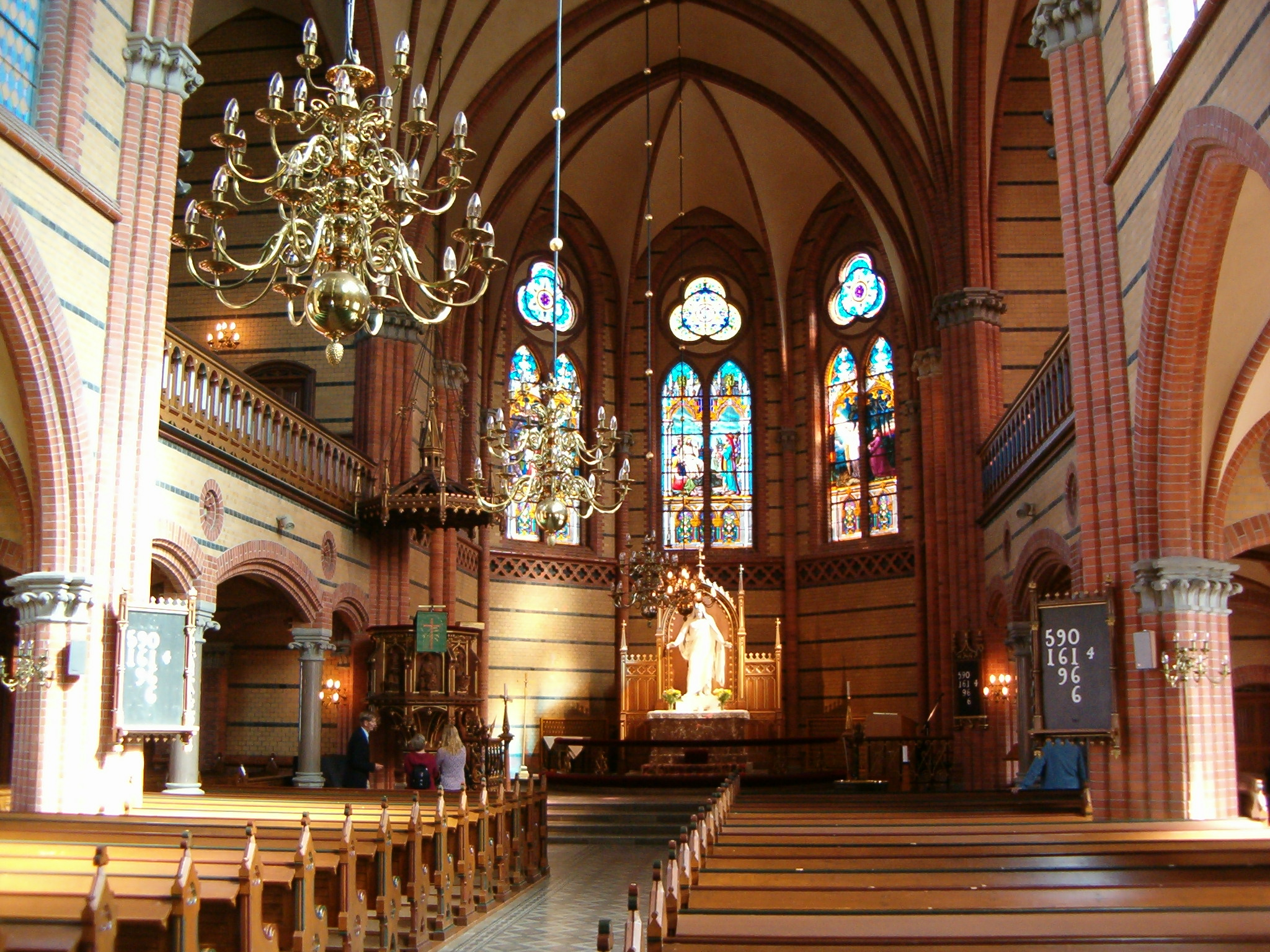 Asmundtorps kyrka